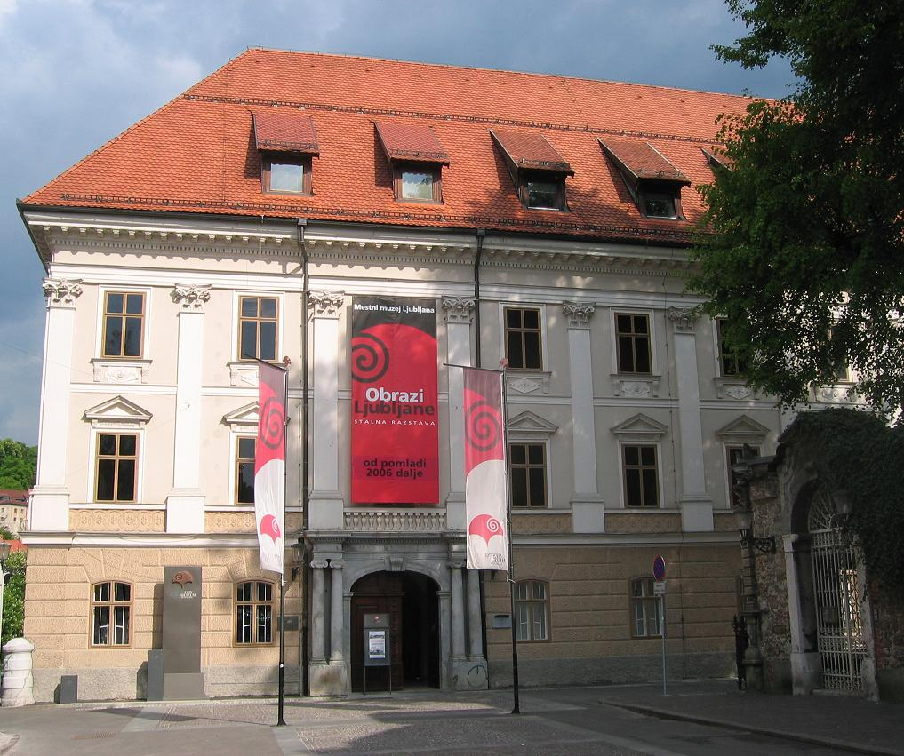 Auersperg palace (Turjaška palača), Ljubljana. / now City museum photo:Ziga 14:57, 10 May 2006 (UTC)